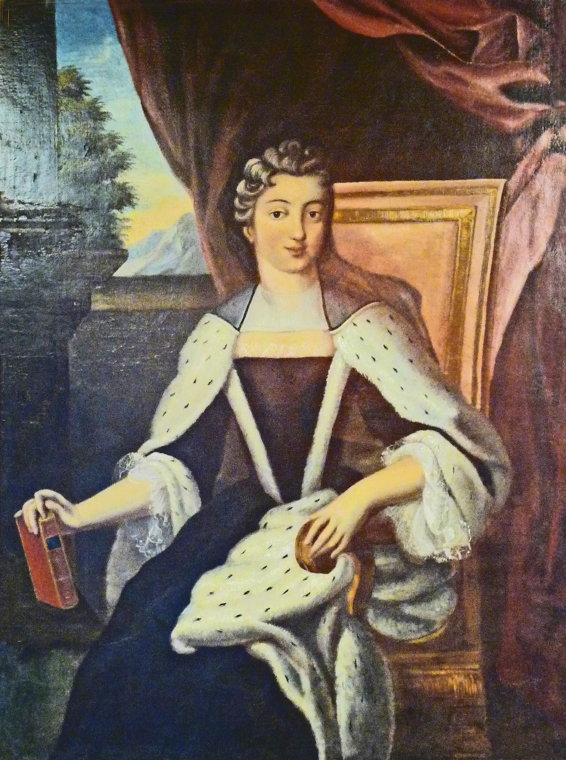 Musée Charles de Bruyères (Remiremont) : portrait de Béatrix-Hiéronyme de Lorraine-Lillebonne, abbesse au Chapitre de Remiremont de 1711 à 1738. Ecole française du XVIIIe siècle. Le tableau se trouvait dans l'ancien hôpital de Remiremont construit en 1724 à son initiative et démoli en 1974.